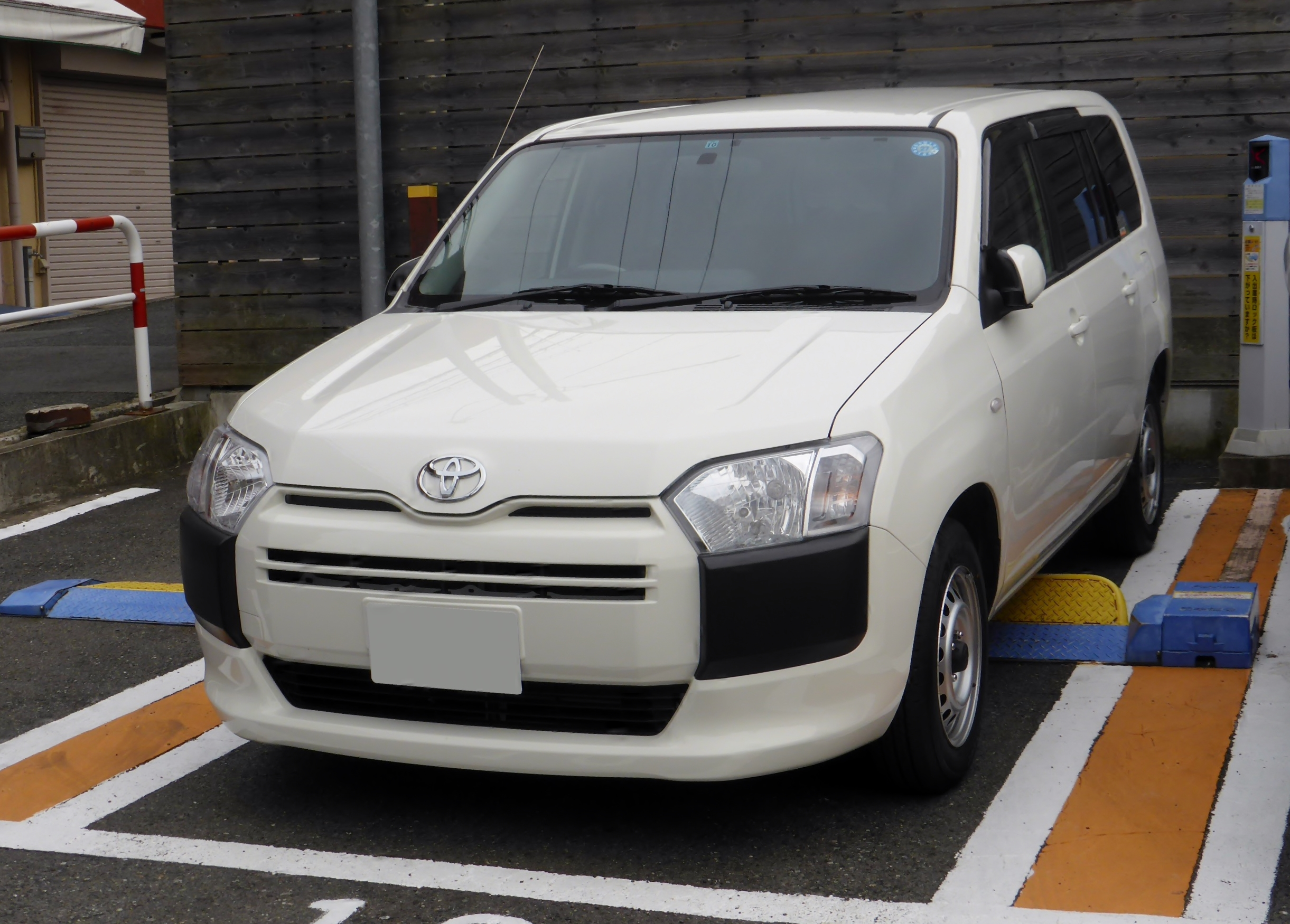 NSP160V後期型トヨタ・プロボックスDXをフロントから撮影。